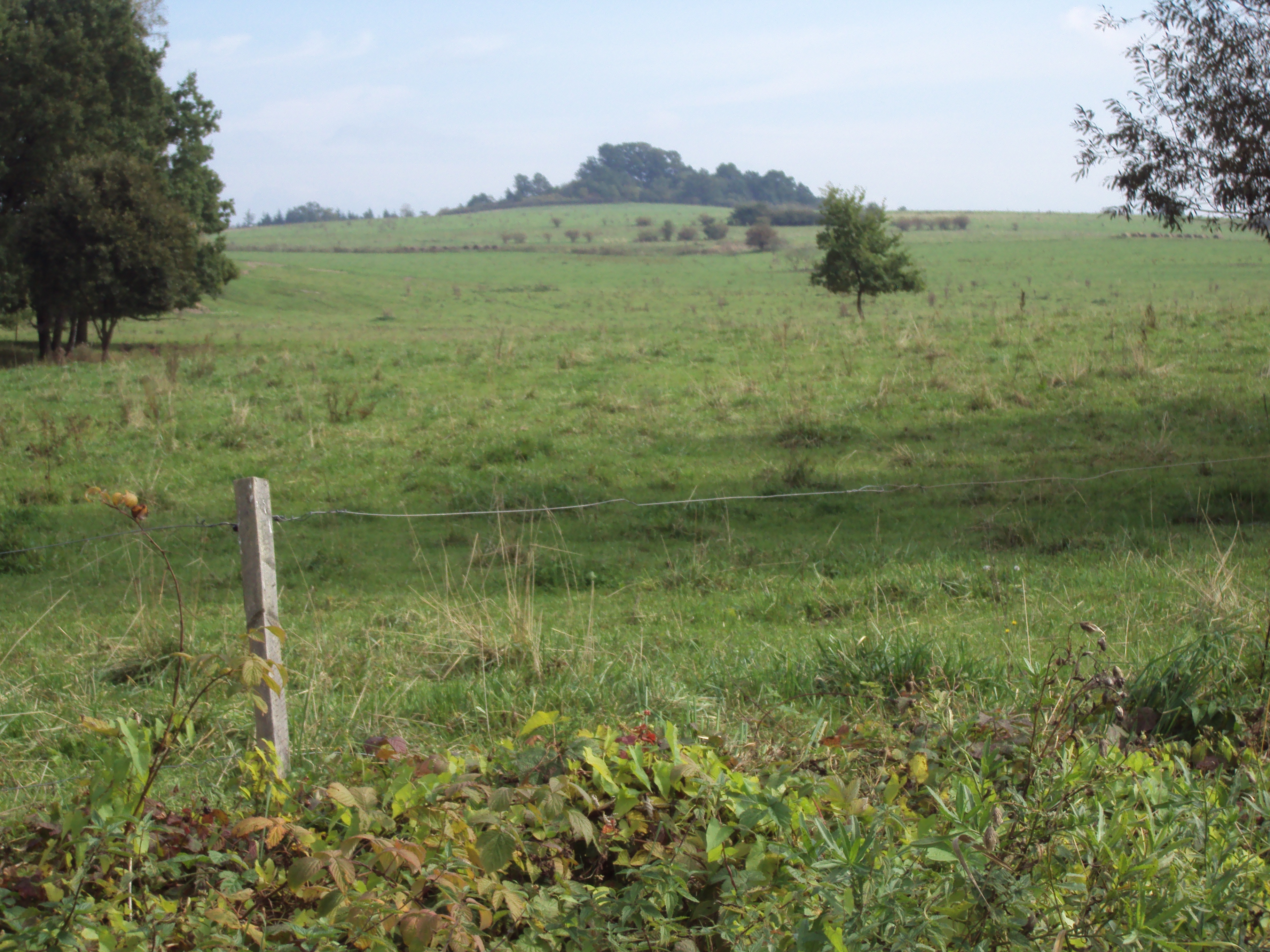 Židovský vršek 323 m. u Dobranova, východně od České Lípy, Zákupská pahorkatina